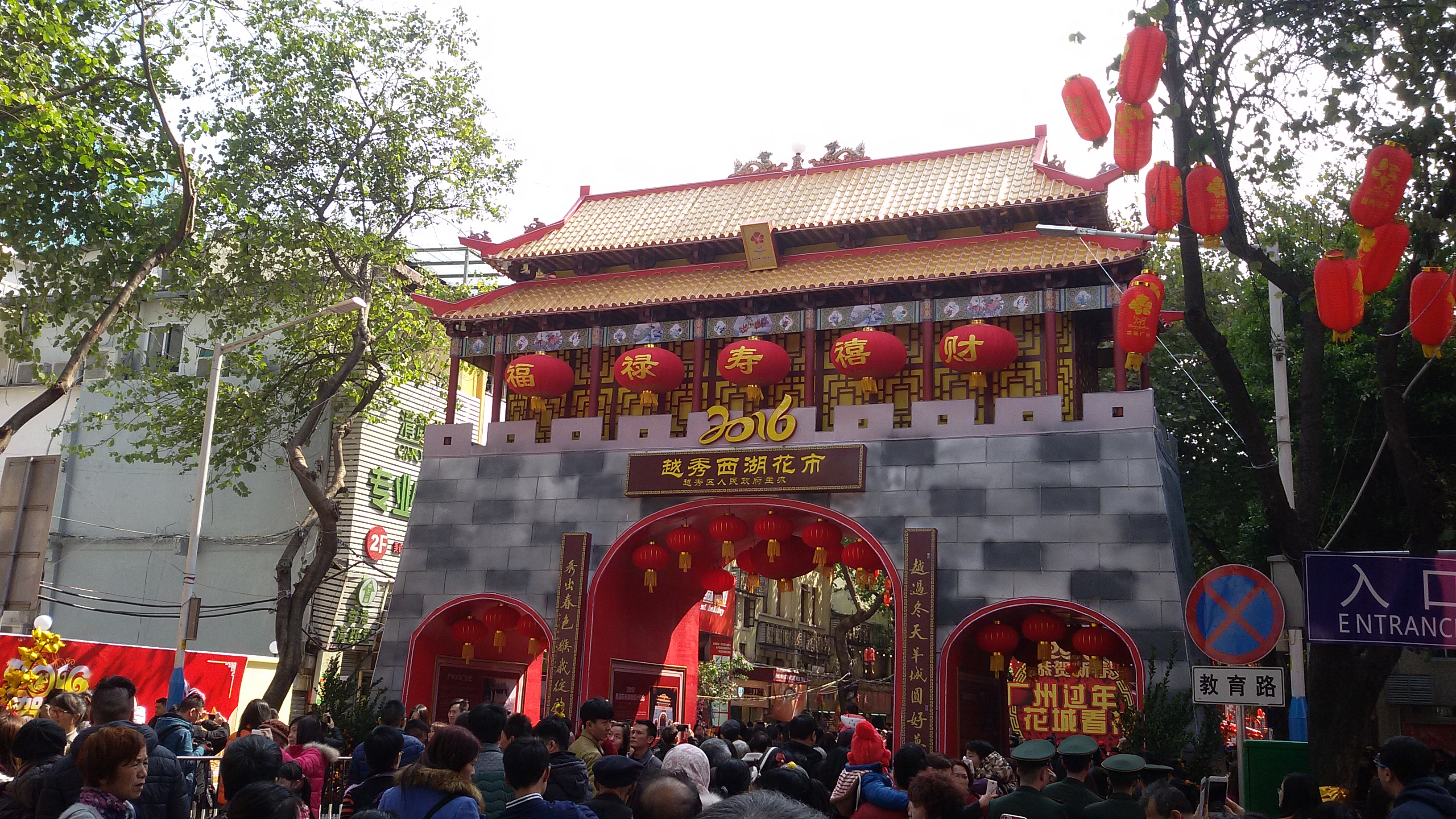 粵語: 越秀西湖花市（2016年）